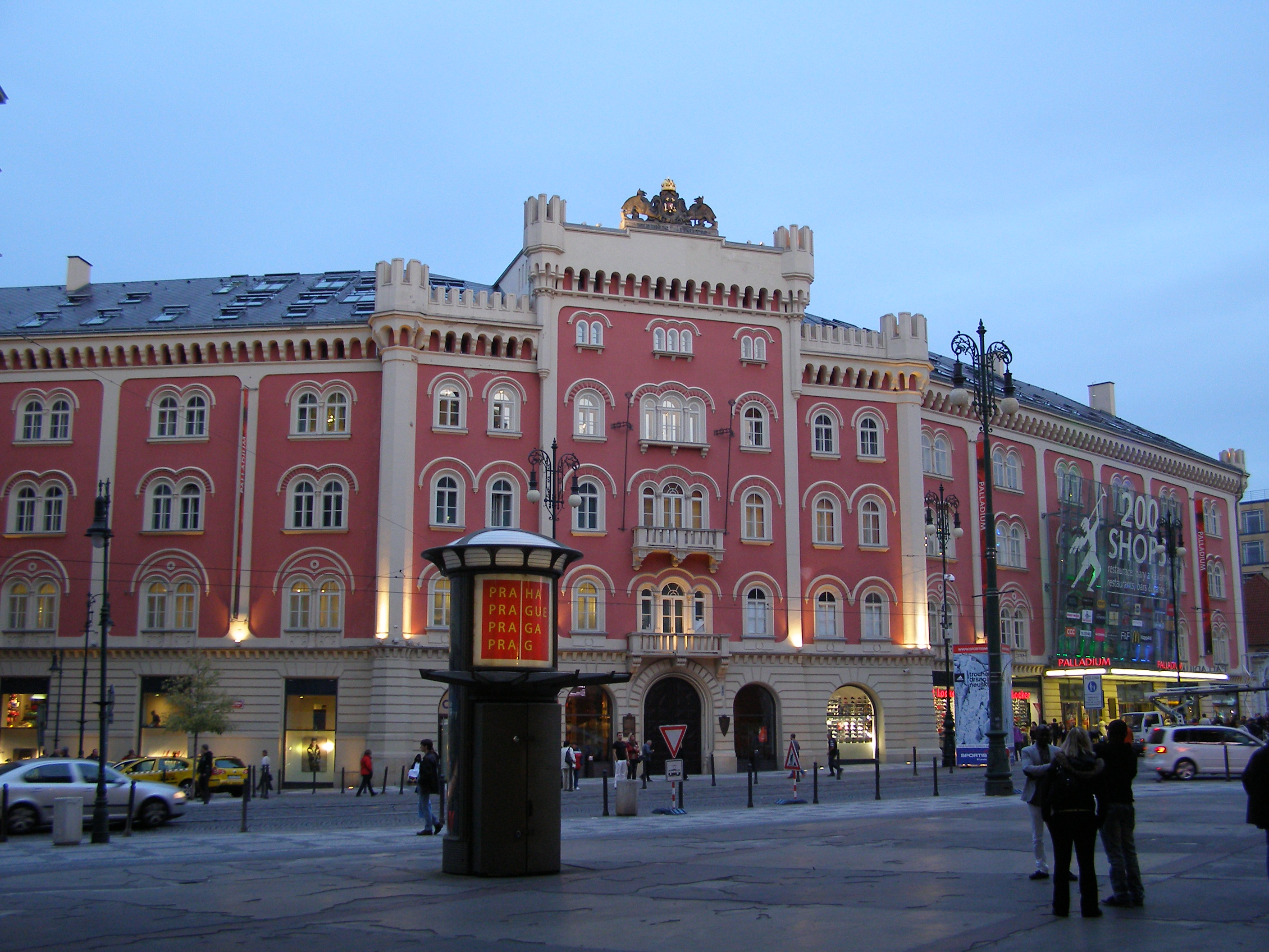 Kasárna Jiřího z Poděbrad, z toho jen: hlavní budova a budova jízdárny (Nové Město), Praha 1, nám. Republiky, Na Poříčí 1078/1, Nové Město